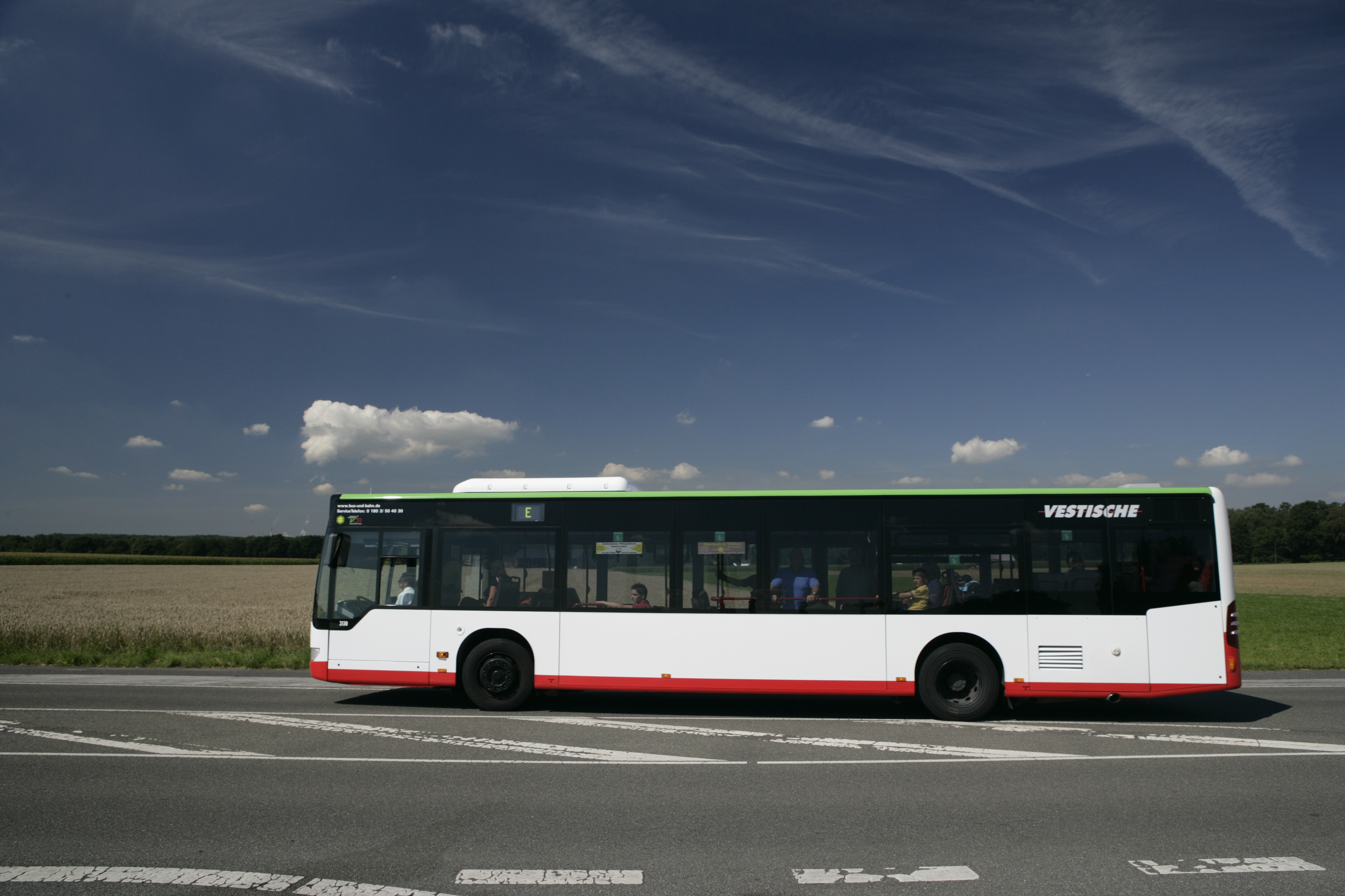 Bus der Vestischen Straßenbahn GmbH im KÖR-Design